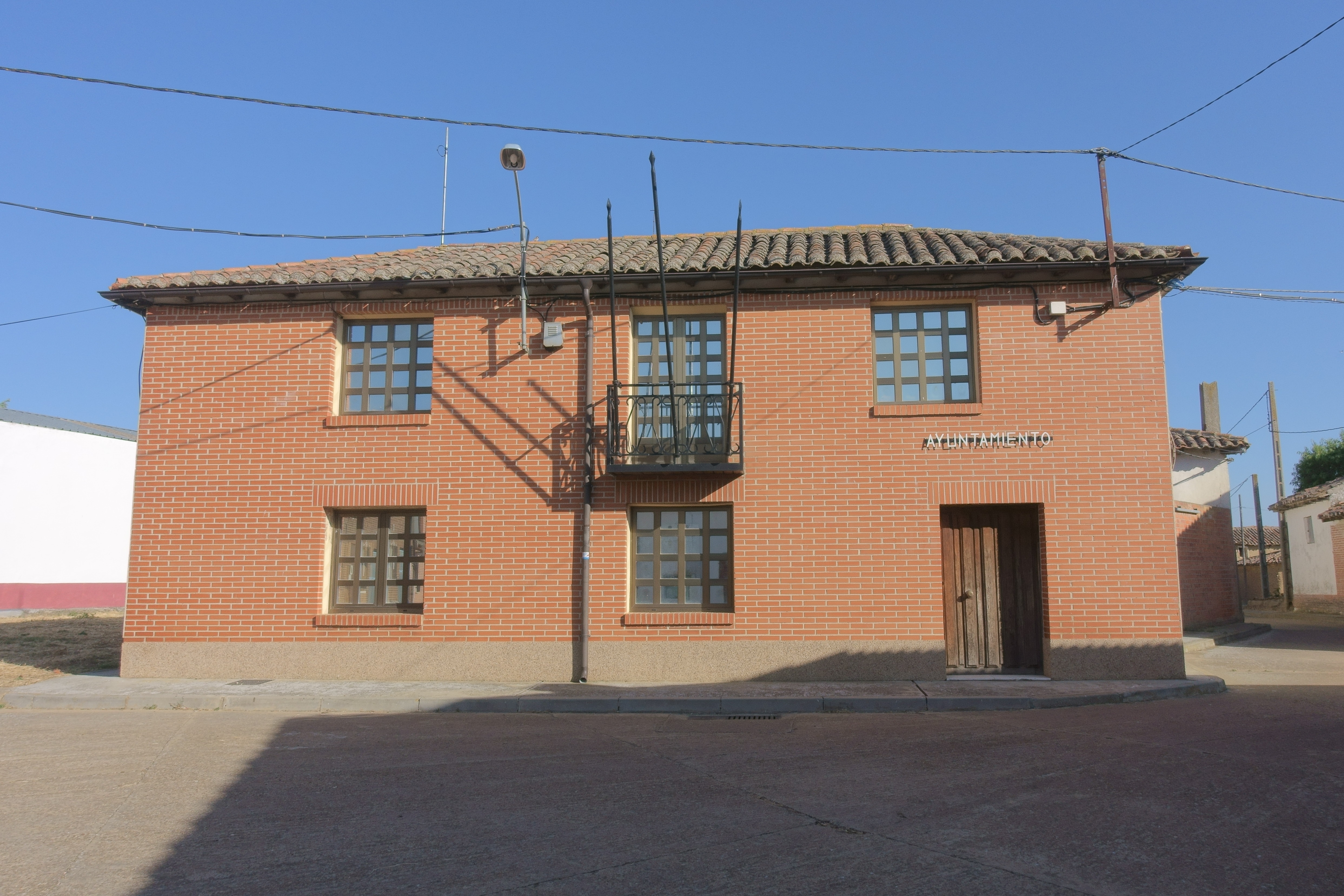 Casa consistorial de Bustillo del Páramo de Carrión (Palencia, España).